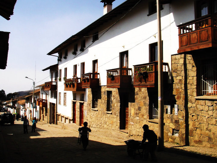 Balcones